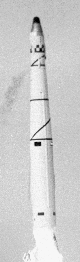 Start rakiety Thor Agena A z satelitą Discoverer 9, typu Corona KH-1, 4 lutego 1960. Ladino: Launch of the Thor Agena A rocket with the Discoverer 9 satellite (Corona KH-1 type), 4 February 1960.